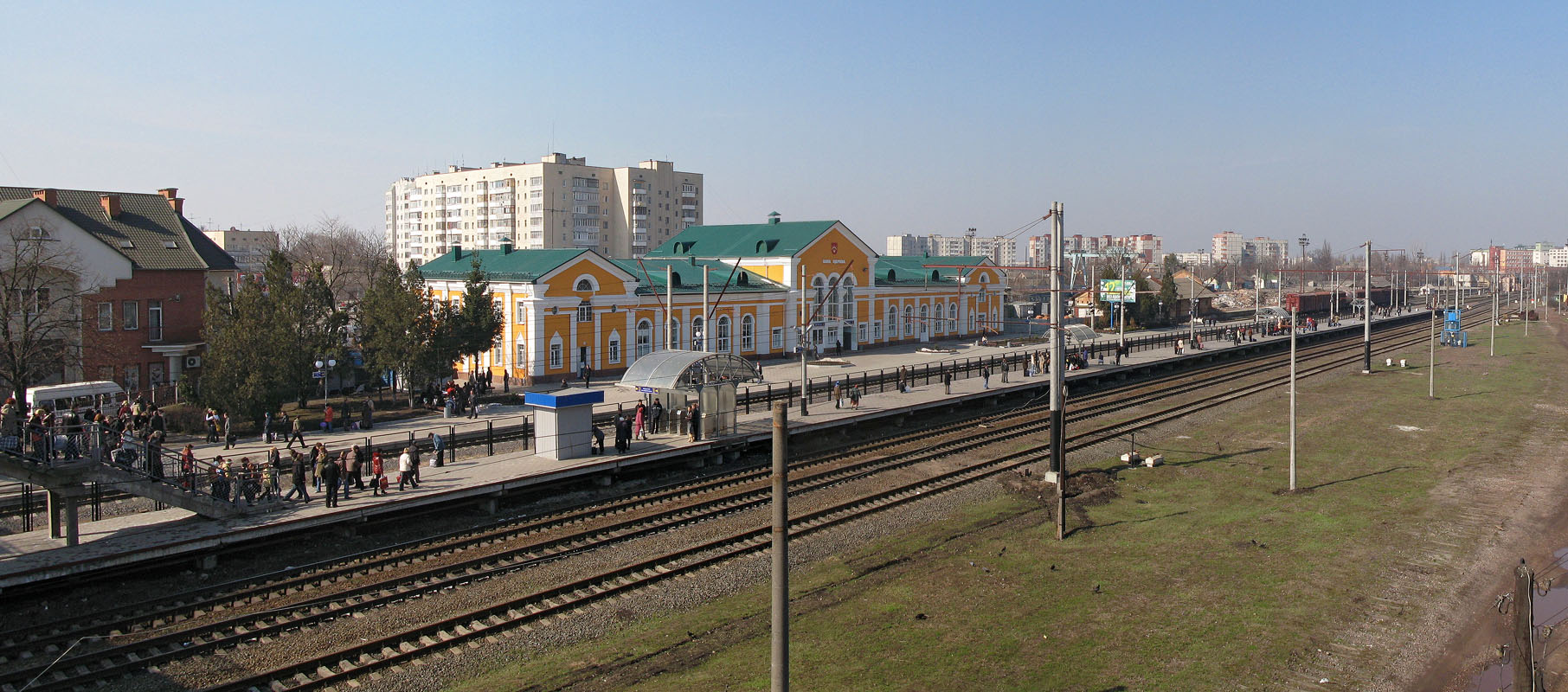 Станція Біла Церква